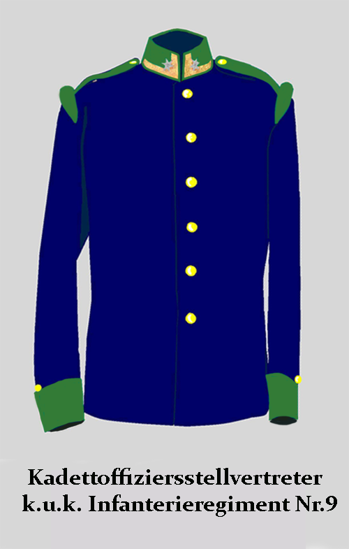 Kadettoffiziersstellvertreter bis 1908/ danach Fähnrich